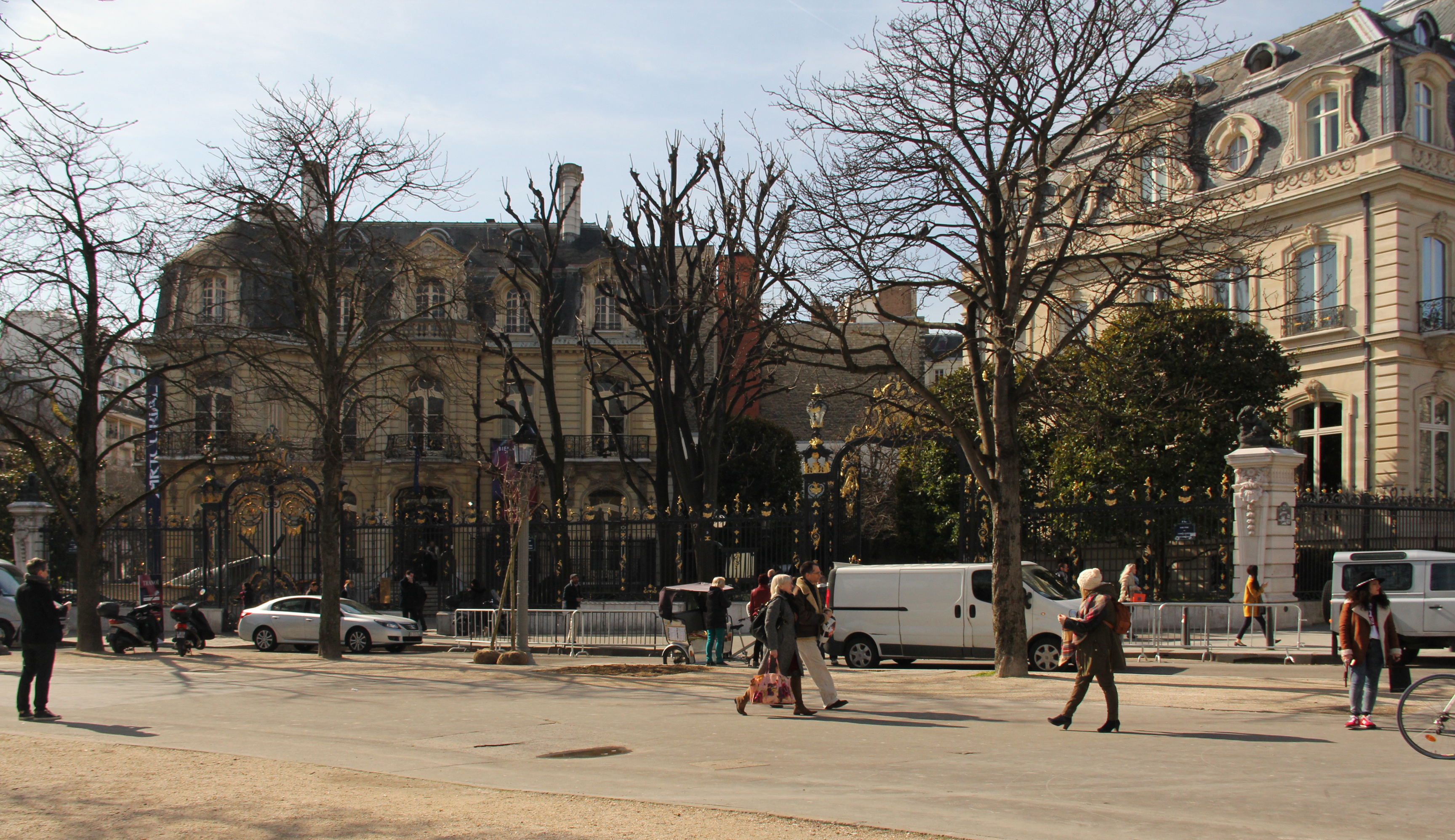 Hôtel Marcel Dassault, Rond-point des Champs-Élysées-Marcel-Dassault, Paris.